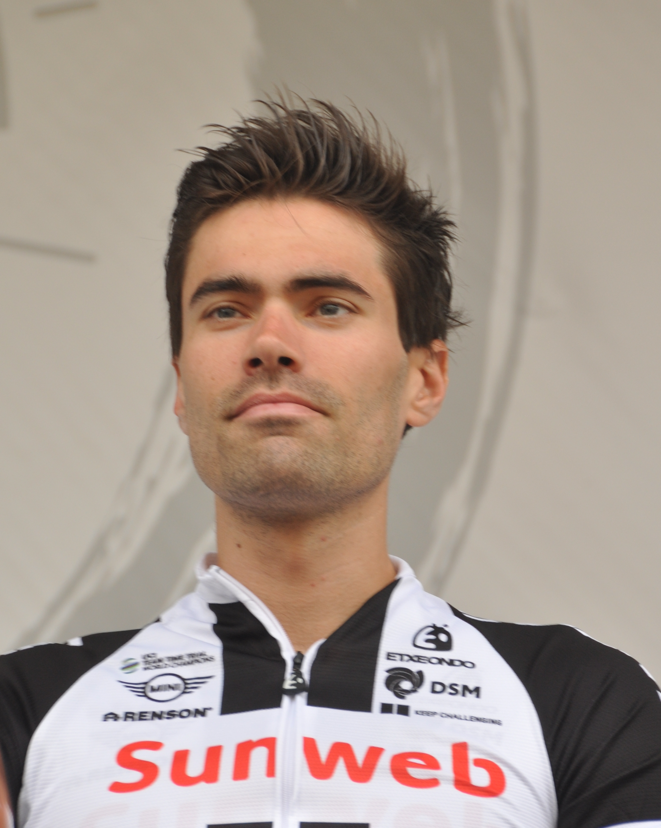 Tom Dumoulin, niederländischer Radsportler